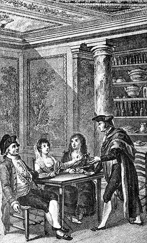 Ilustración para la obra dramática La comedia nueva o El café de Leandro Fernández de Moratín de una edición de París de 1825.